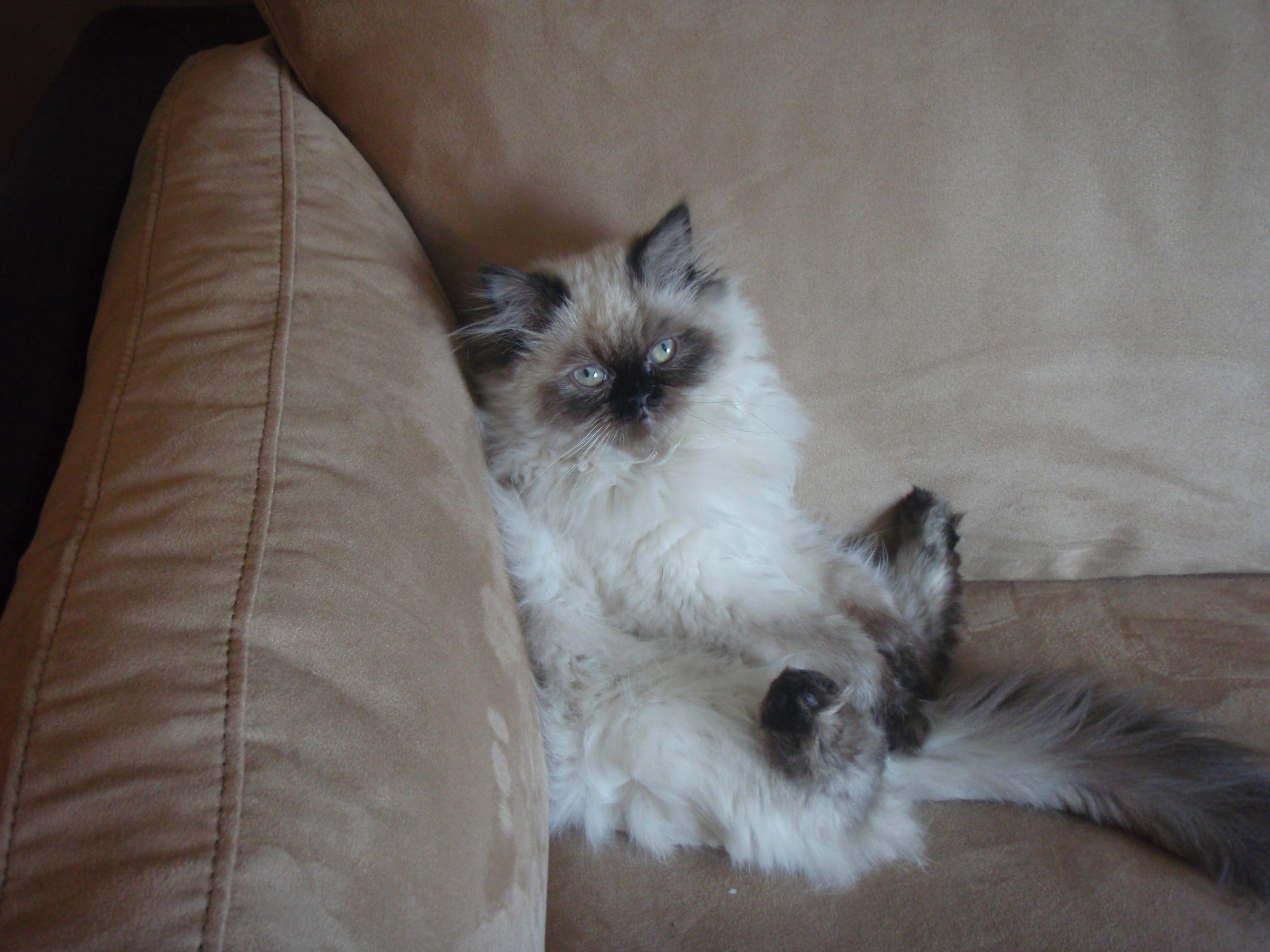 Portait d'un himalayen de couleur seal point.